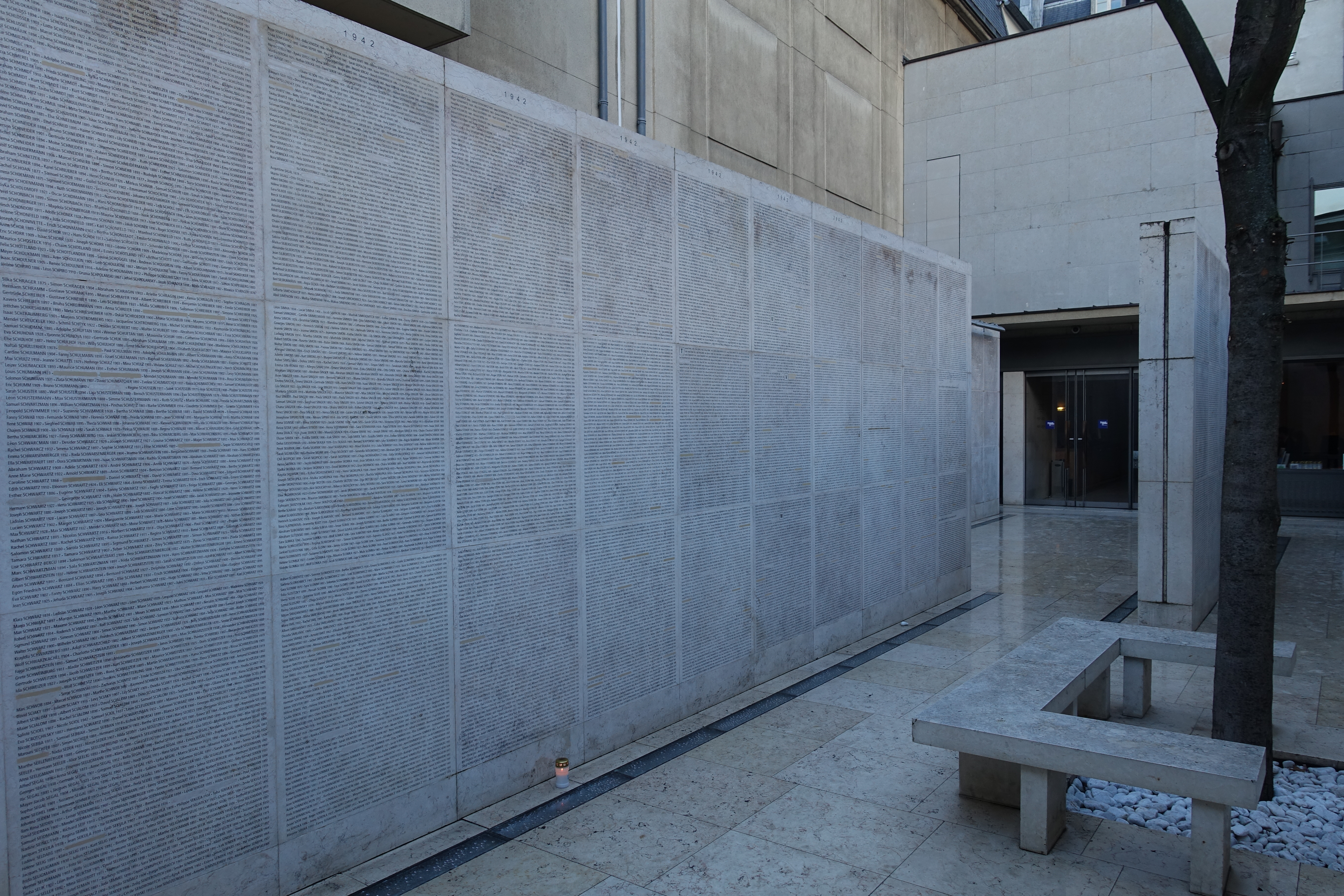 Mémorial de la Shoah @ Paris Mémorial de la Shoah, the holocaust museum in Paris, France.